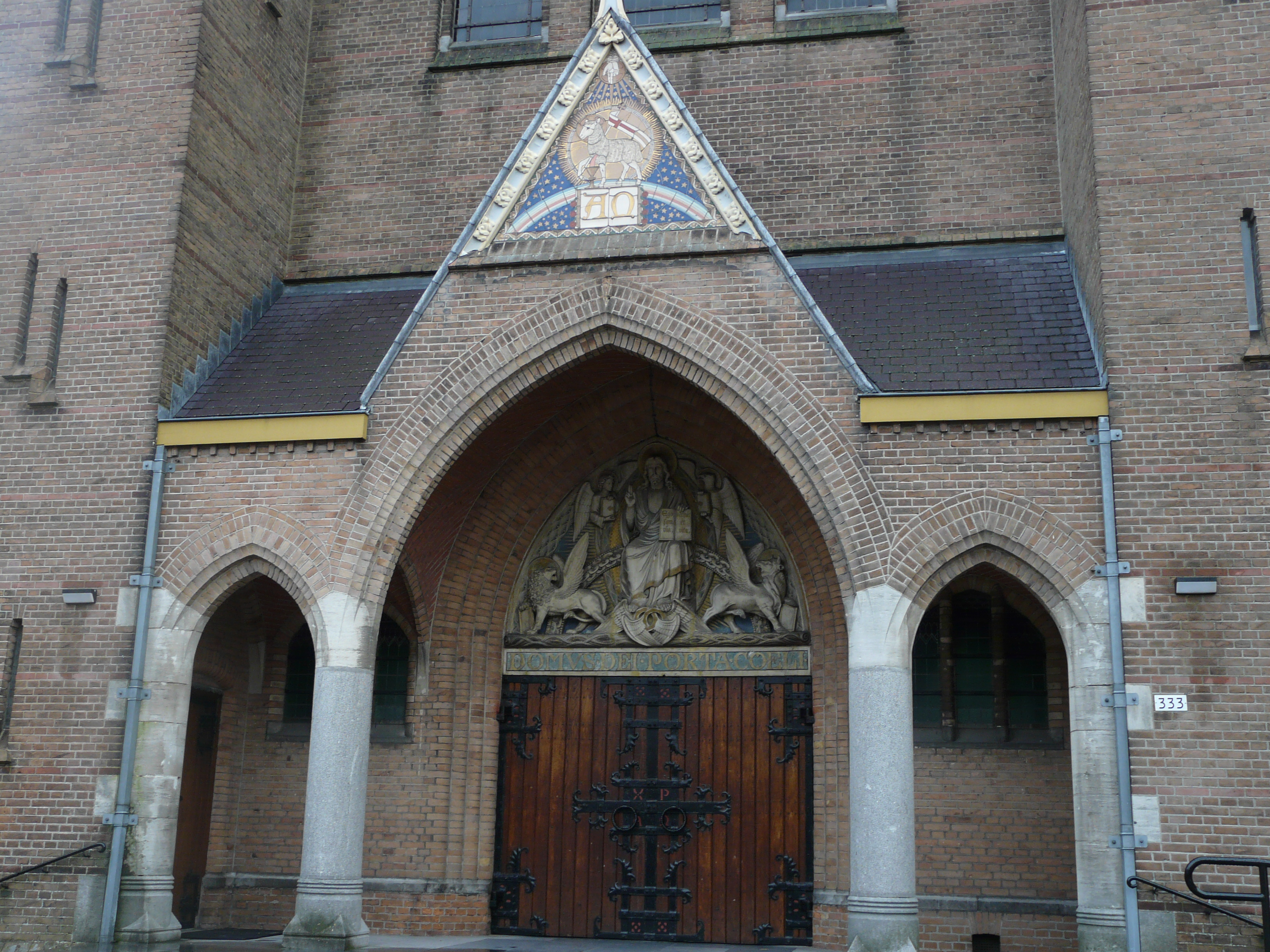 Portaal van de Sint-Laurentiuskerk.